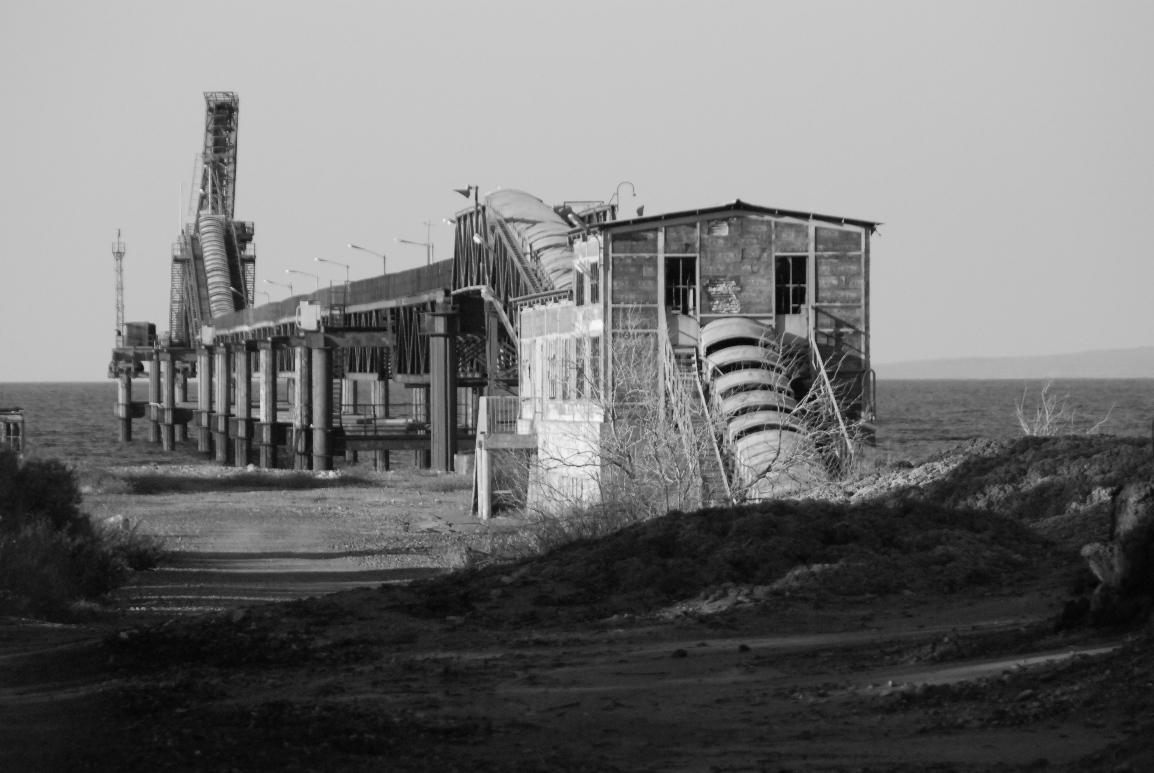 Karavostasi dock